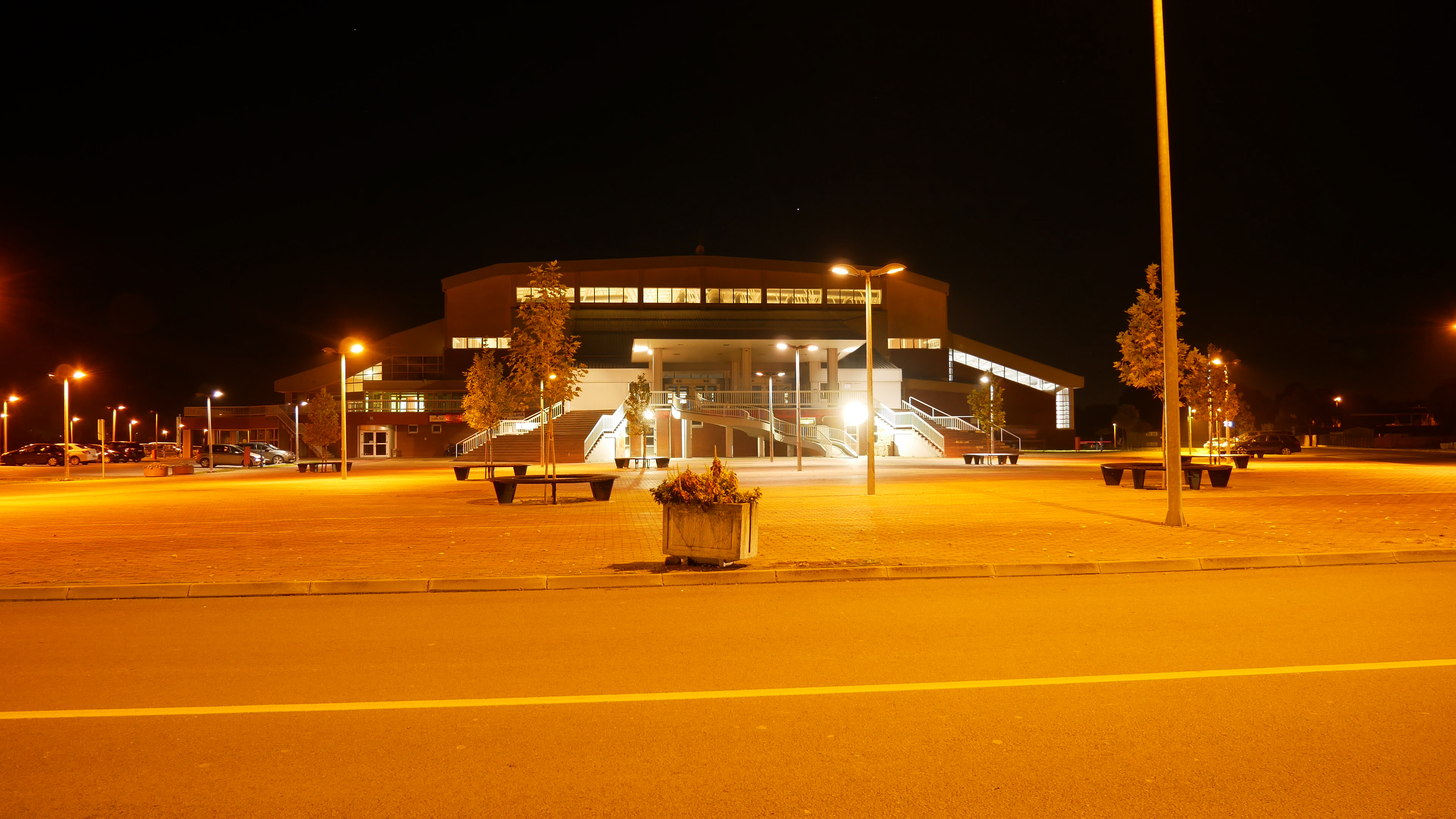 Dvorana Vijuš u noći